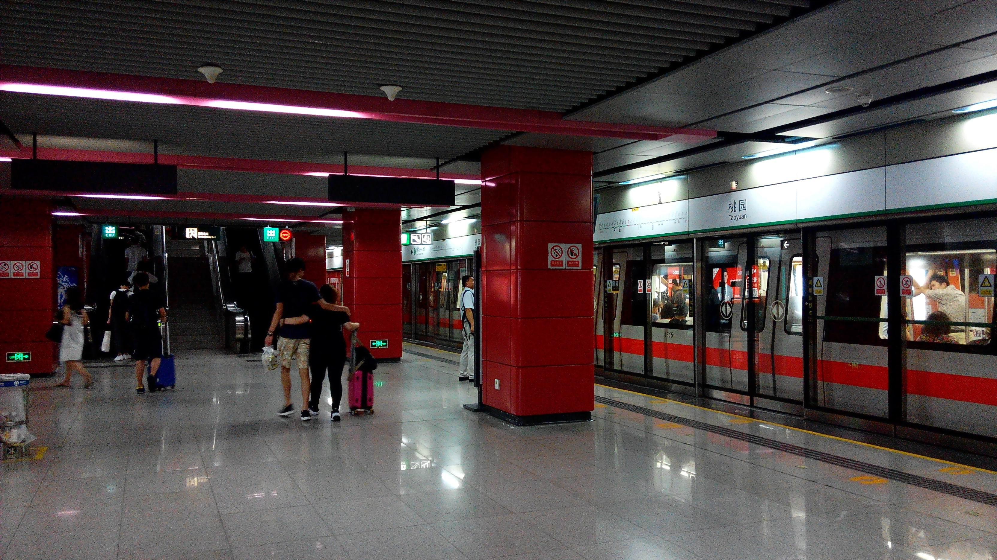 深圳地铁1号线 桃园站 站台